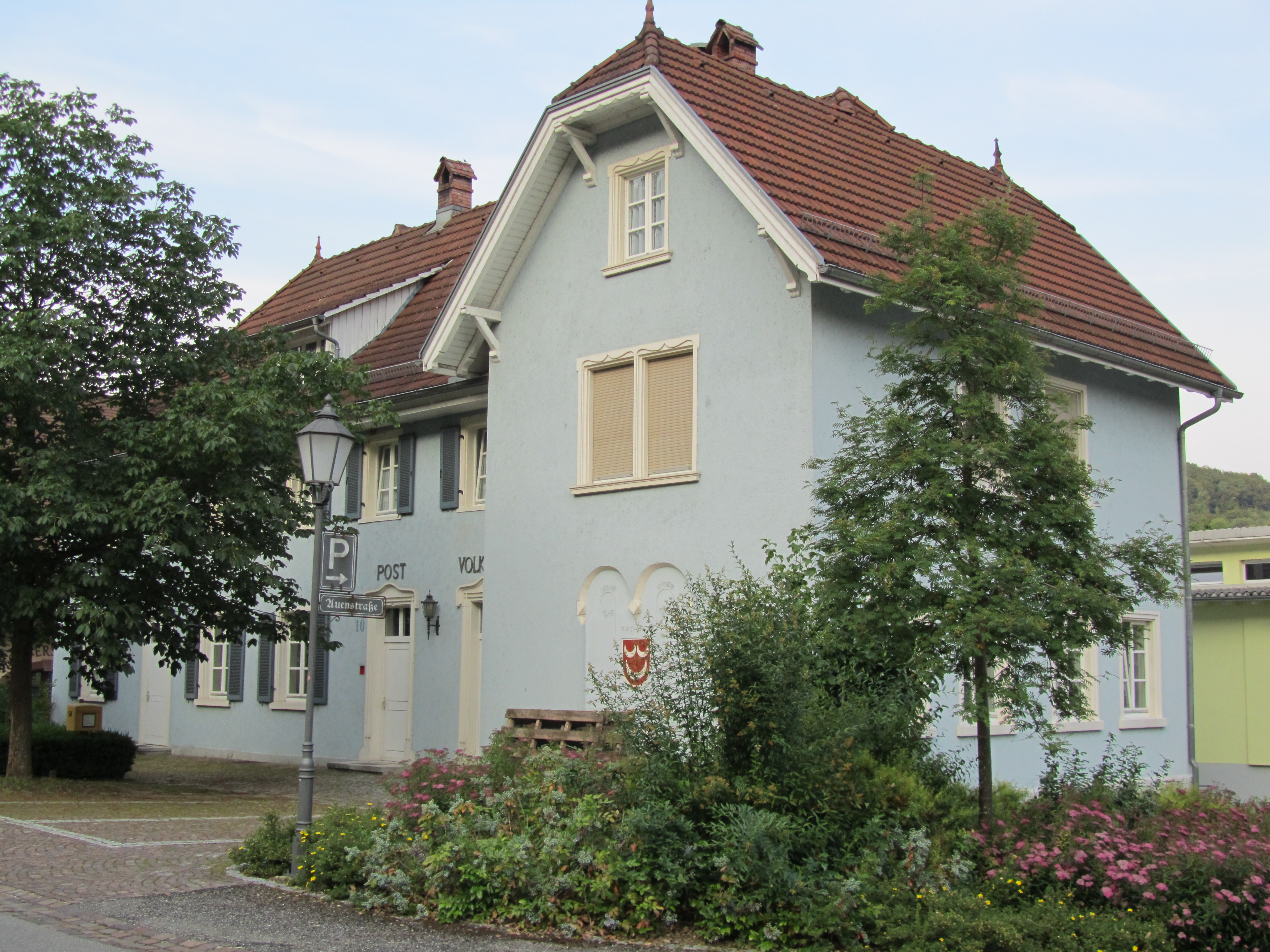 das ofteringer rathaus